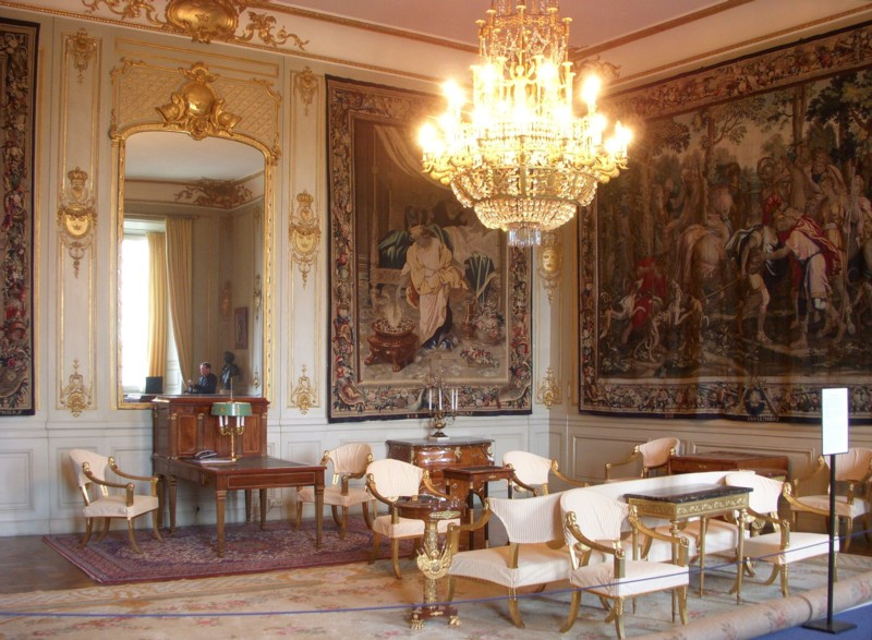 Stockholms slott, Meleagersalongen